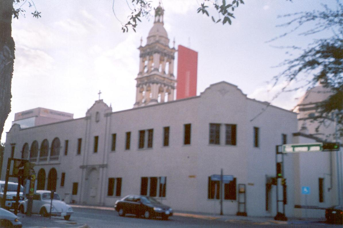 Catedral de Monterrey.